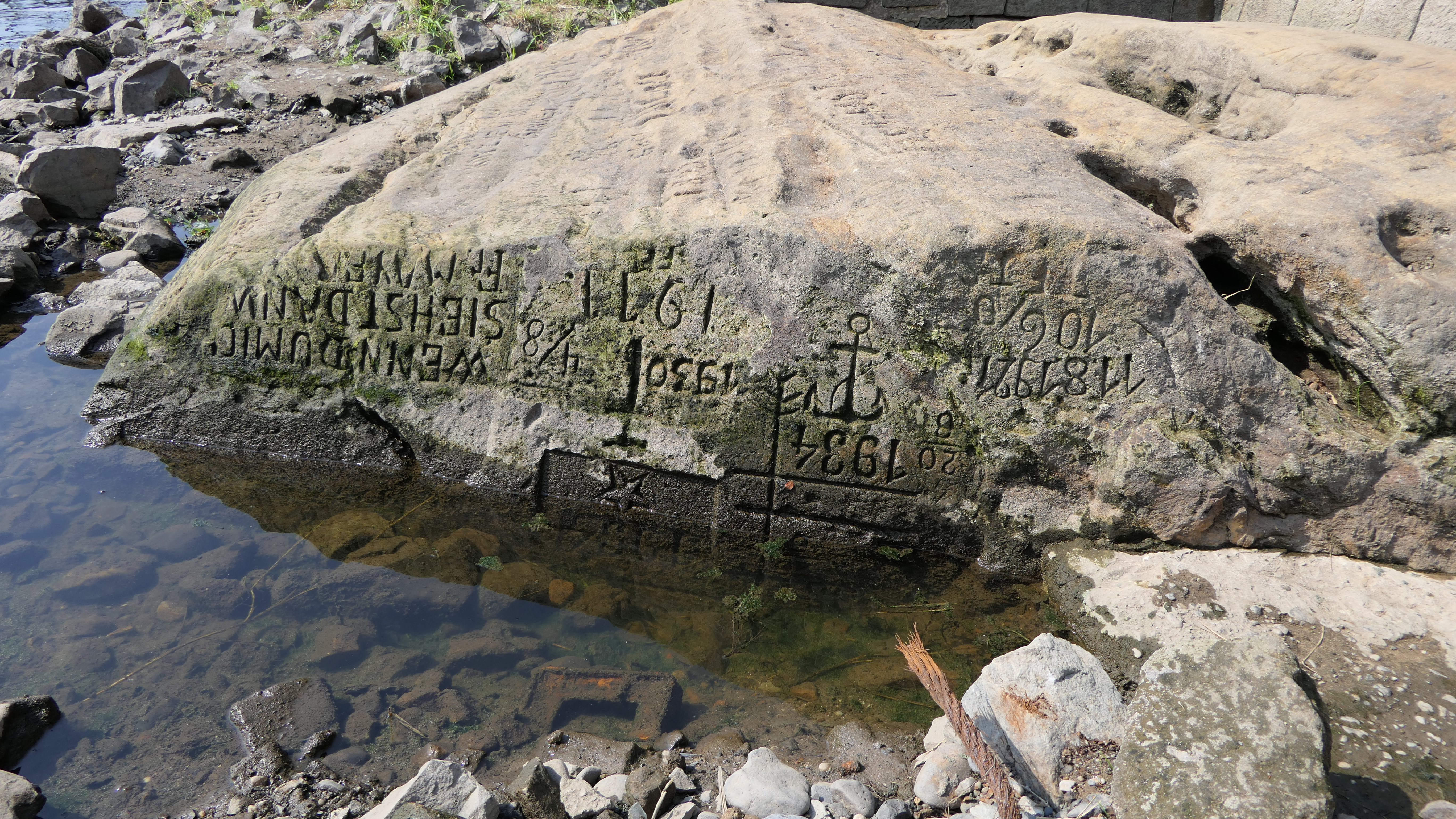 Hungerstein in Decin